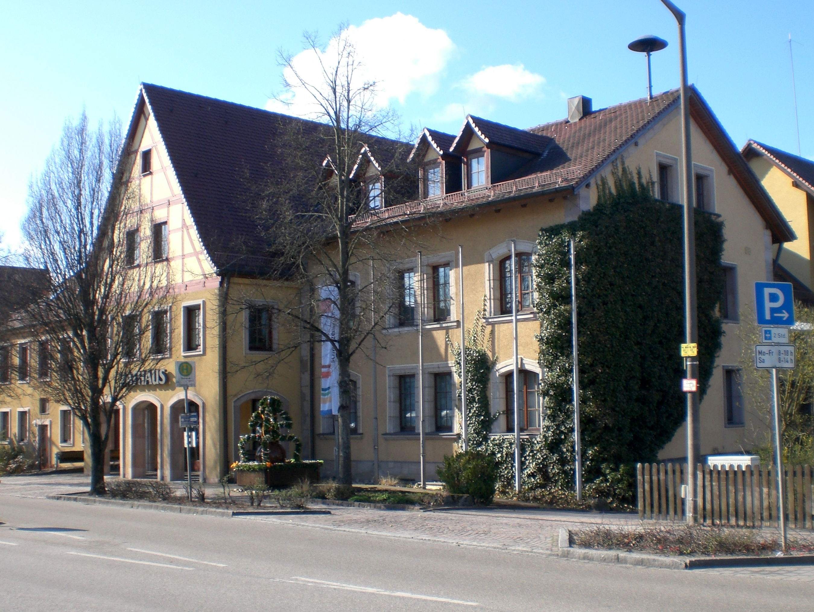 Rathaus Ochenbruck, Schwarzenbruck